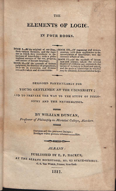 Frontespizio